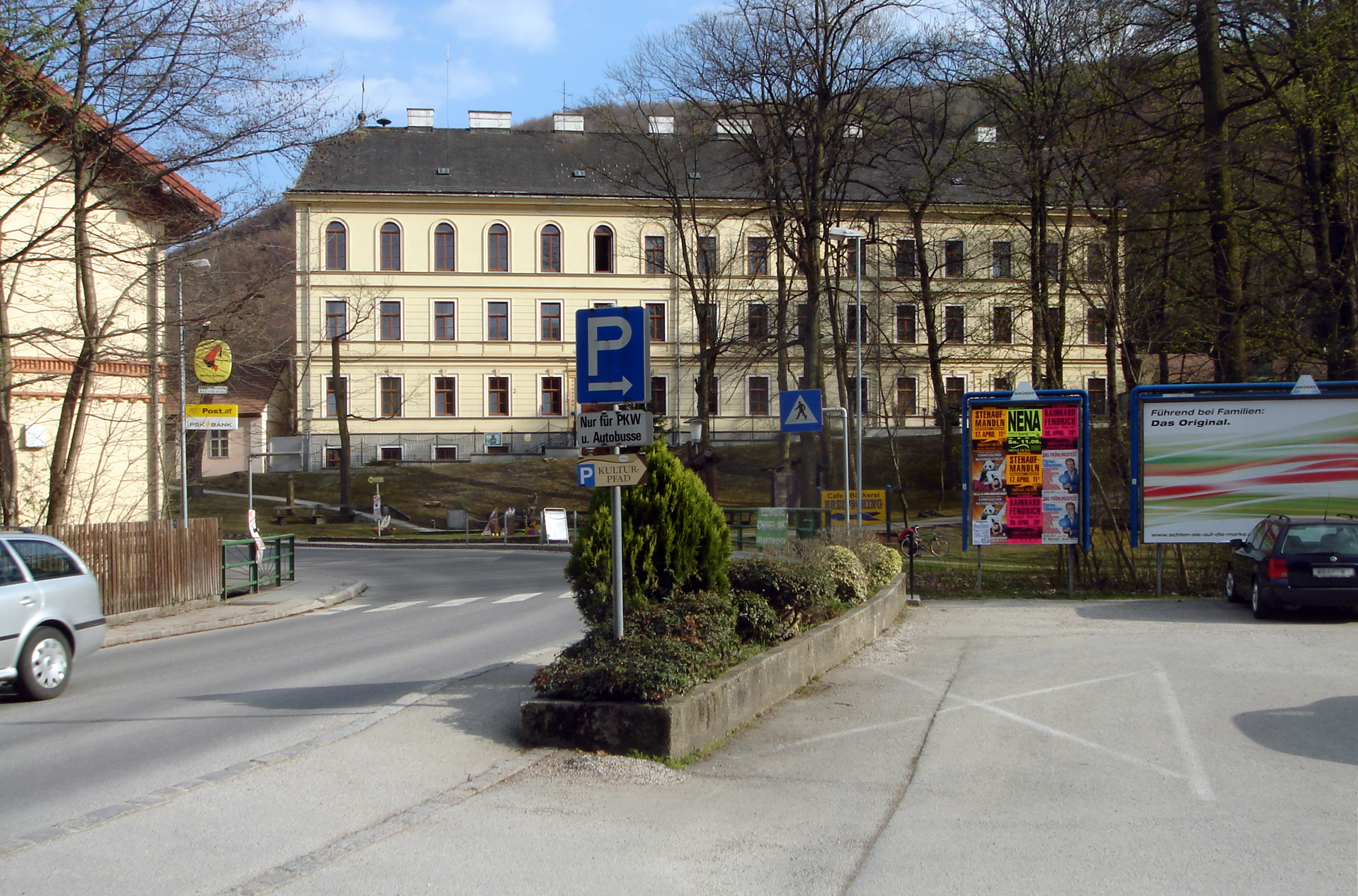 Seebenstein (NÖ), Herminenhaus der Schulschwestern vom Orden des heiligen Franziskus in Wien. (erb. 1882/1891)